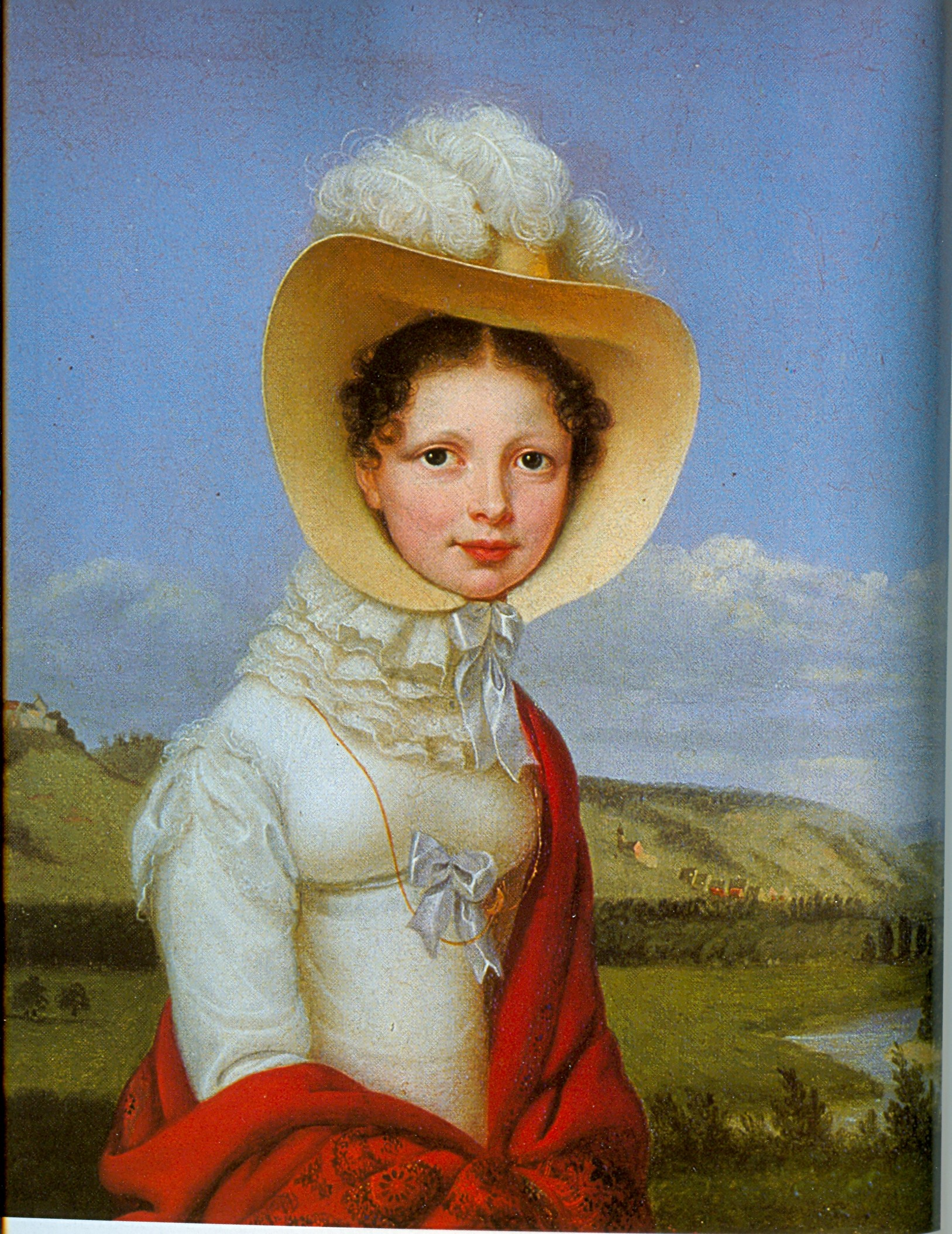 Königin Katharina, zweite Gemahlin von König Wilhelm I.label QS:Lde,"Königin Katharina, zweite Gemahlin von König Wilhelm I."